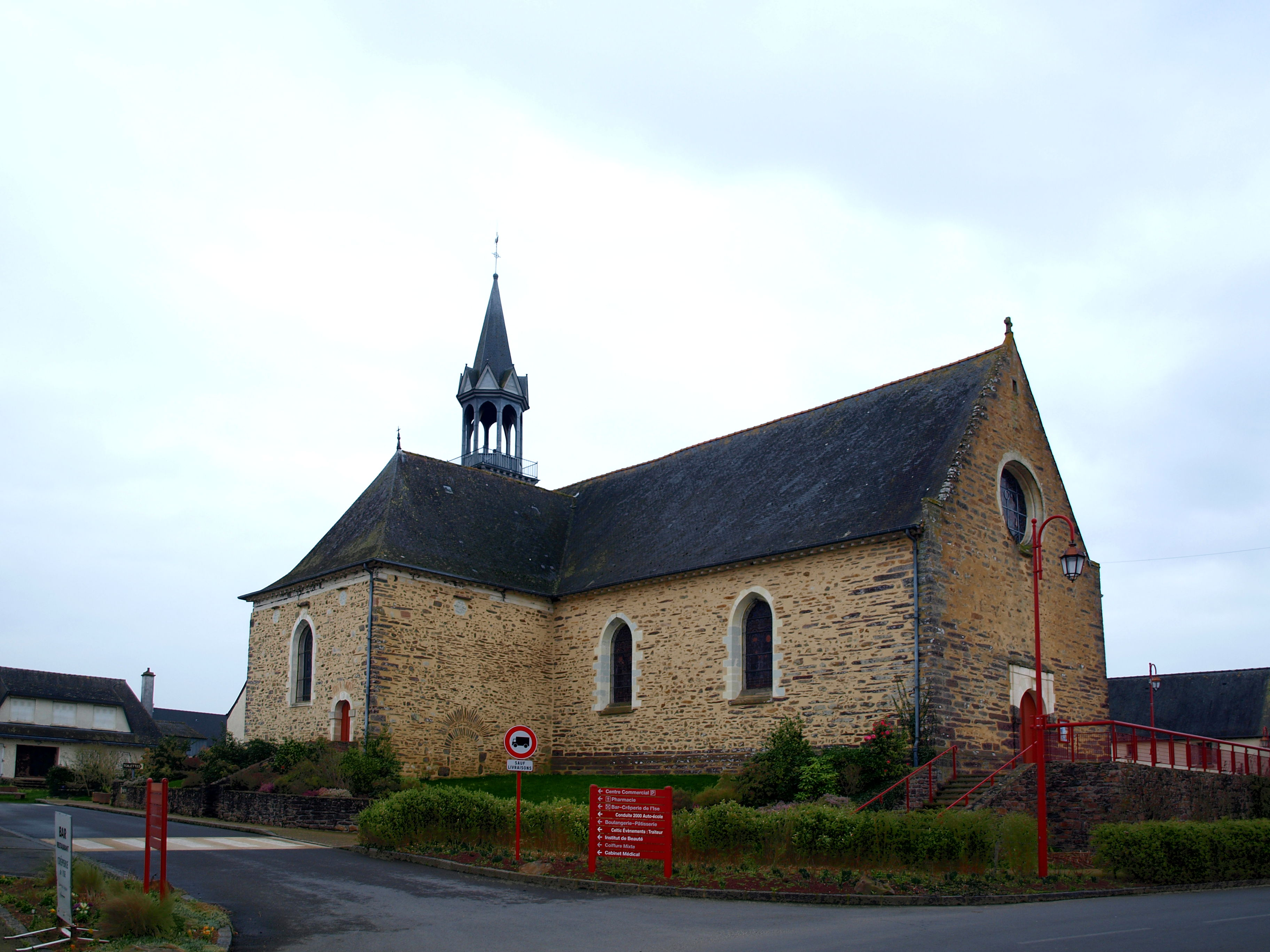 Bourgbarré (Ille-et-Vilaine, France) ; église